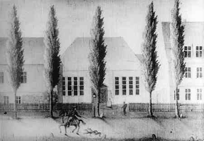 Celle, französisch-reformierte Kirche Anfang des 18. Jahrhunderts